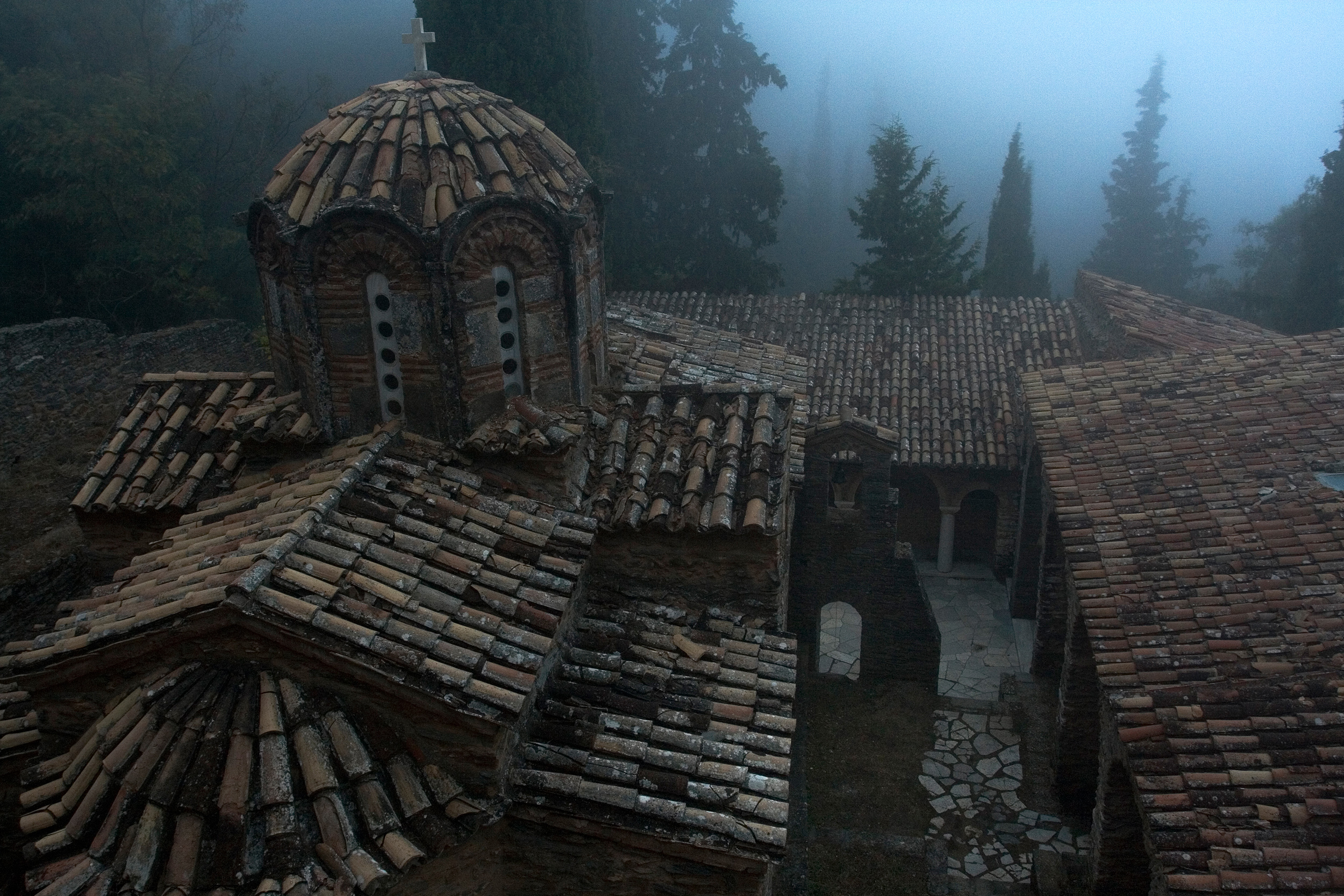 Μονή Αστερίου This is a photography of Natura 2000 protected area with ID GR3000006